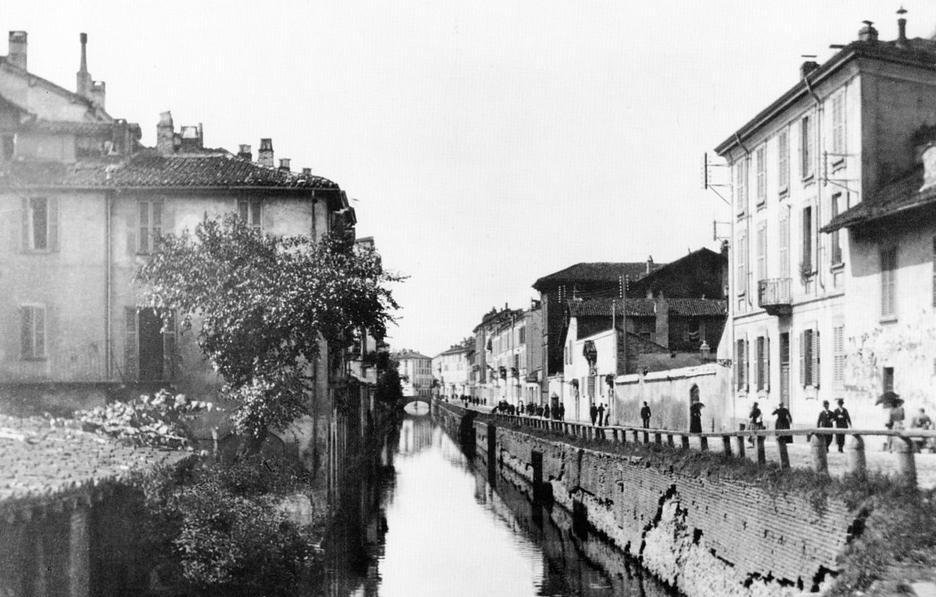 Milano, il Naviglio di San Gerolamo (oggi via Carducci).